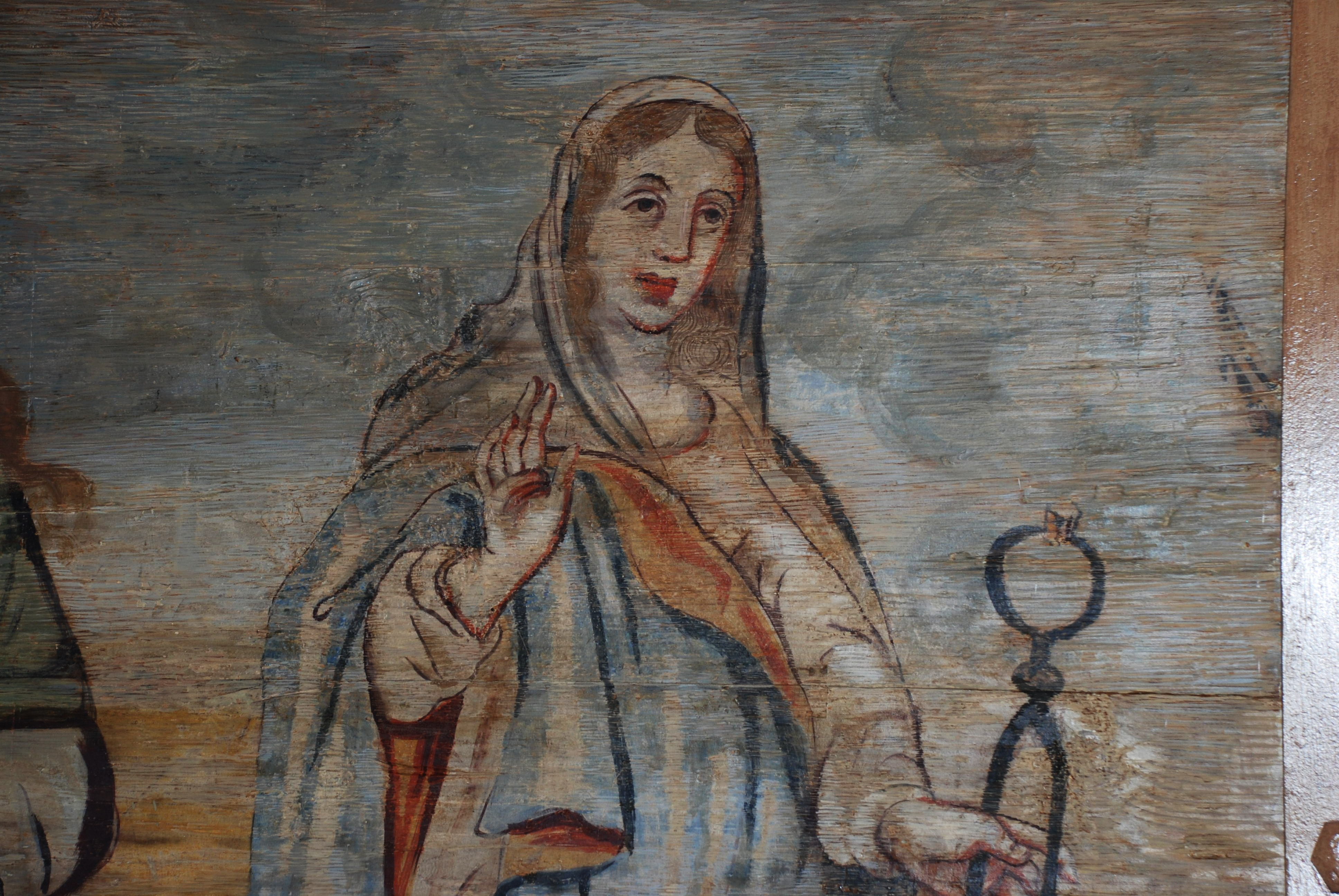 Dekoracja malarska w nawie, św. Apolonia